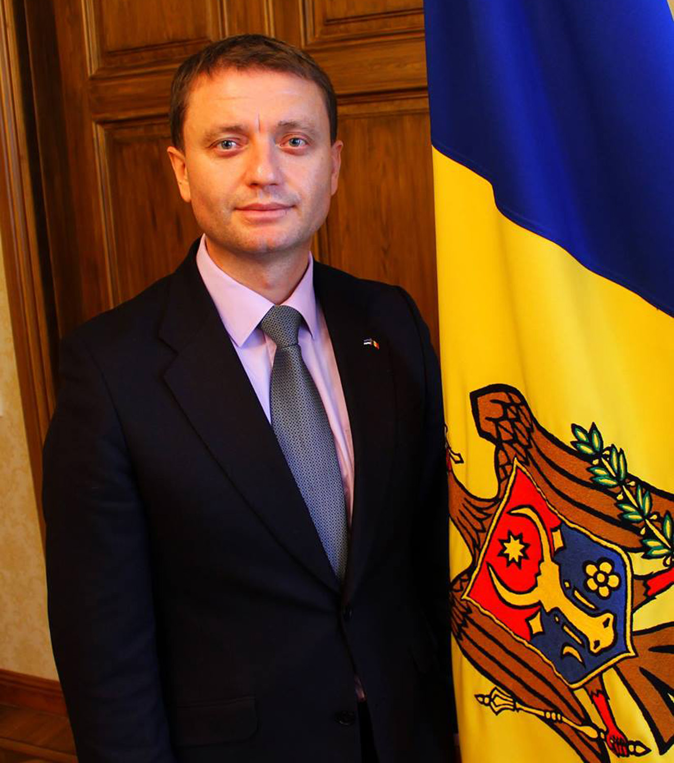 Виктор Гузун - 2-ой Чрезвычайный и полномочный посол Молдовы в Эстонии